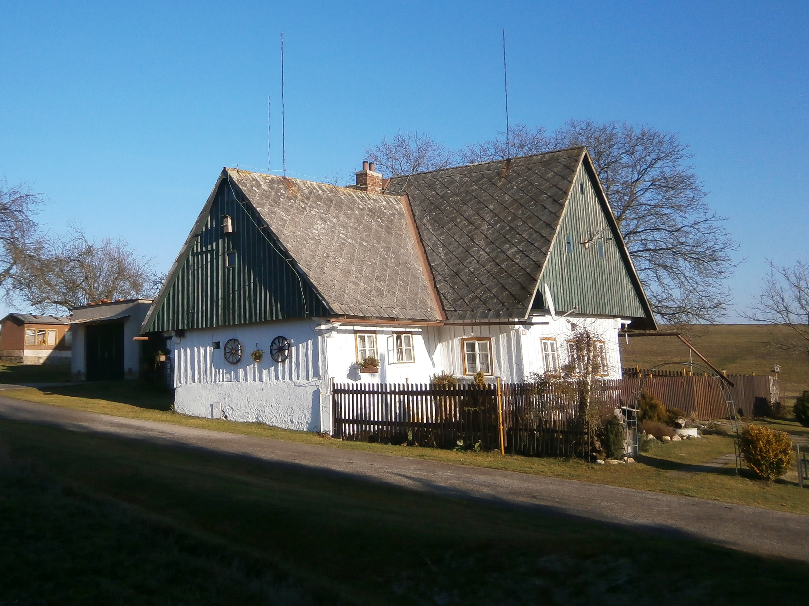 Posadov čp. 15 (Mezilečí)